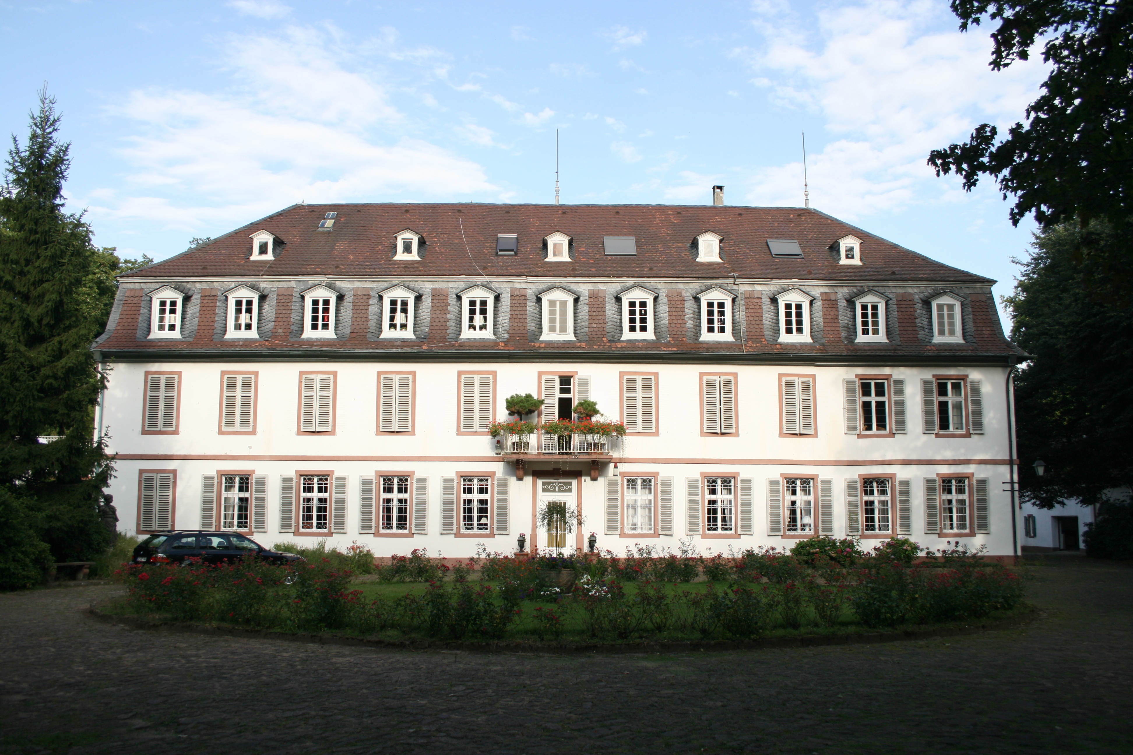 Schloss Philippseich bei Dreieich-Götzenhain, Hauptgebäude.